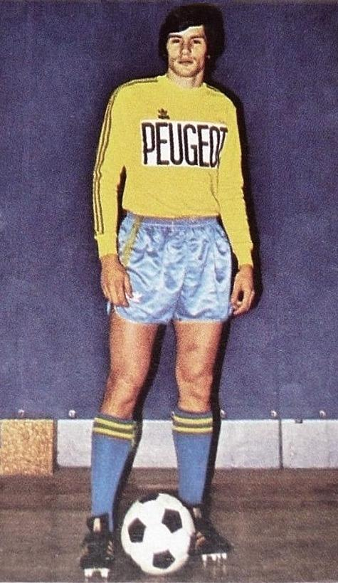 Gérard Soler en 1973 au FC Sochaux, 'Ageducatifs 1973 - 1974', Panini figurina n°273.